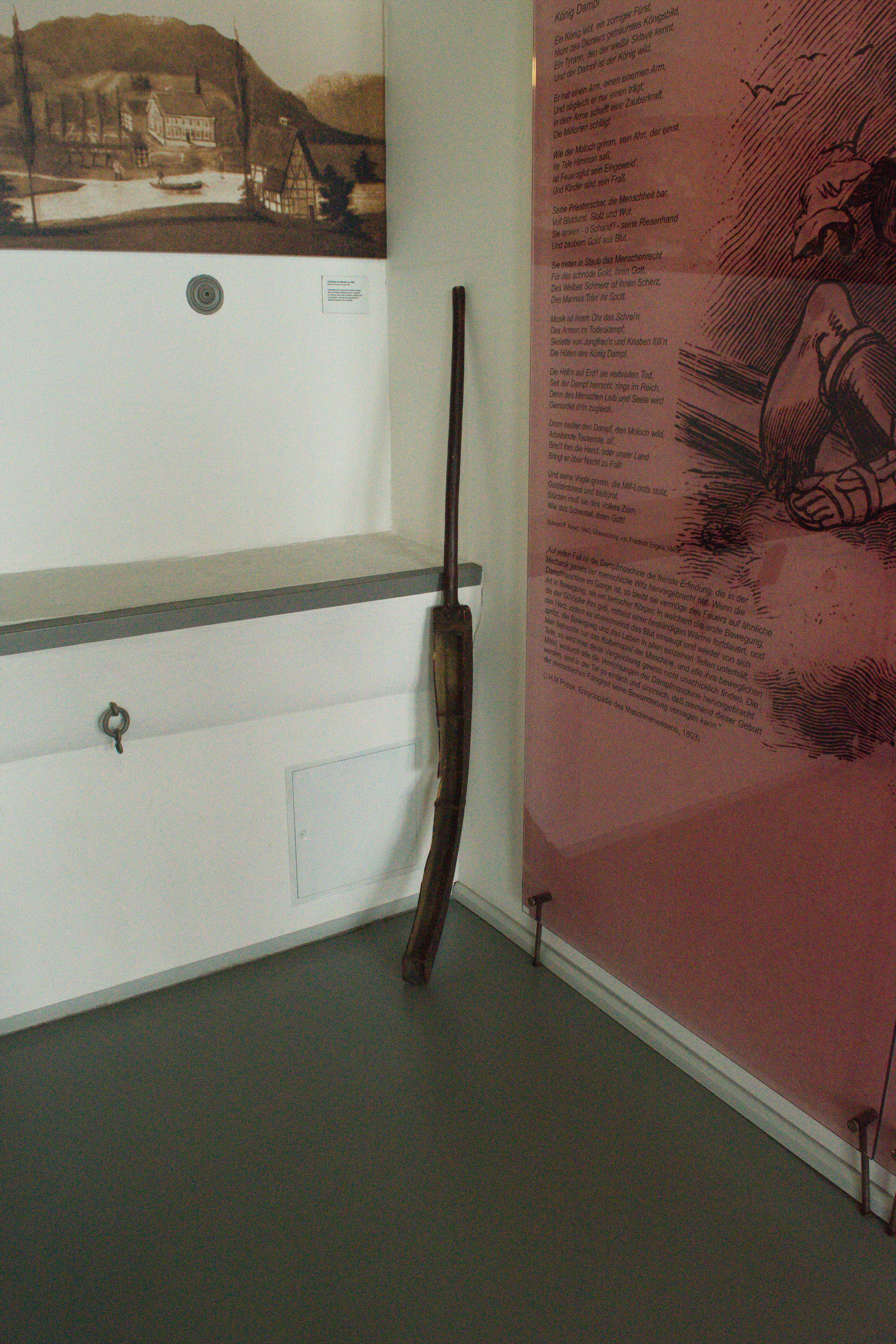 Historisches Zentrum, Wuppertal